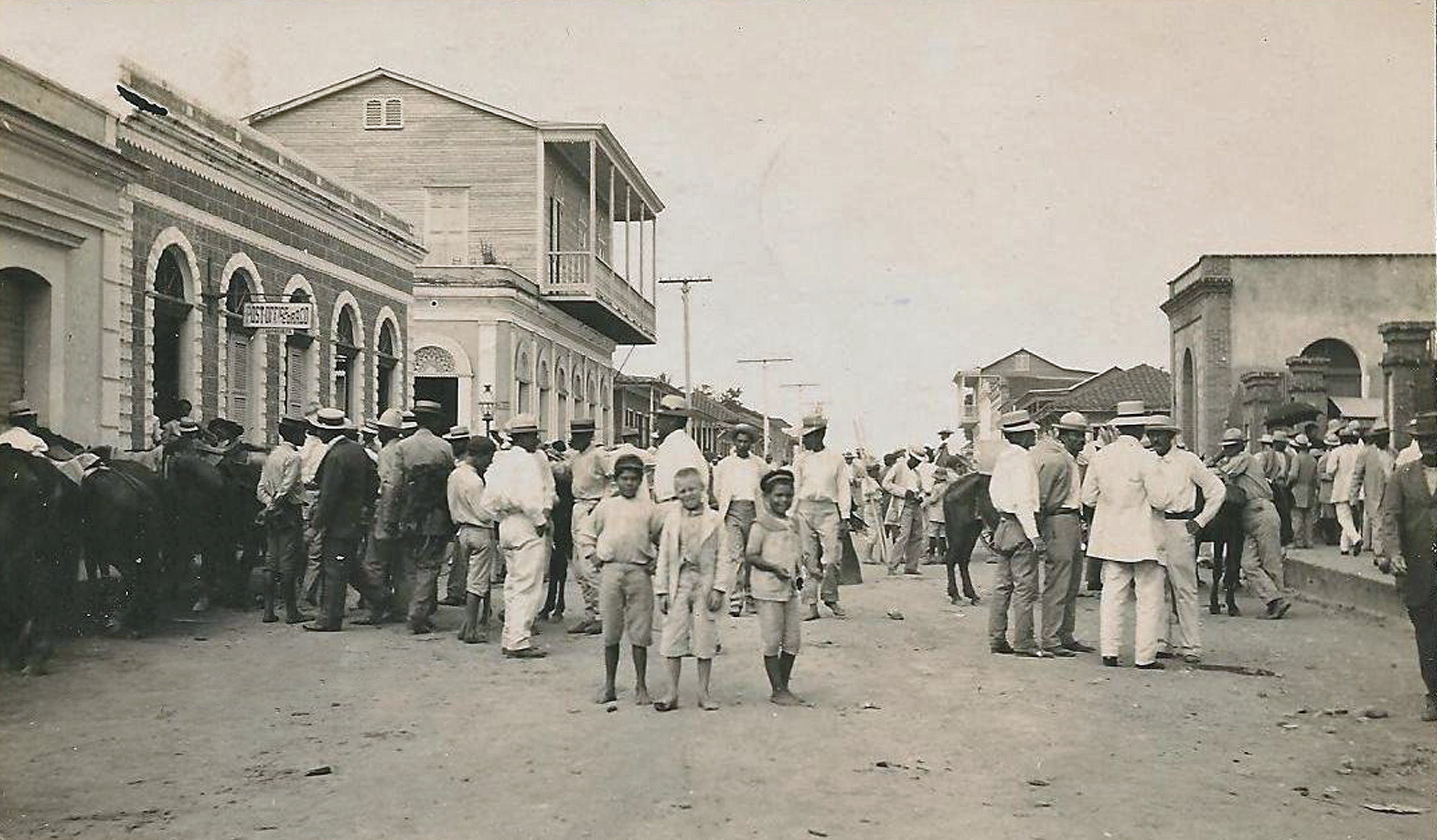 Cabo Rojo a principios del siglo 20.